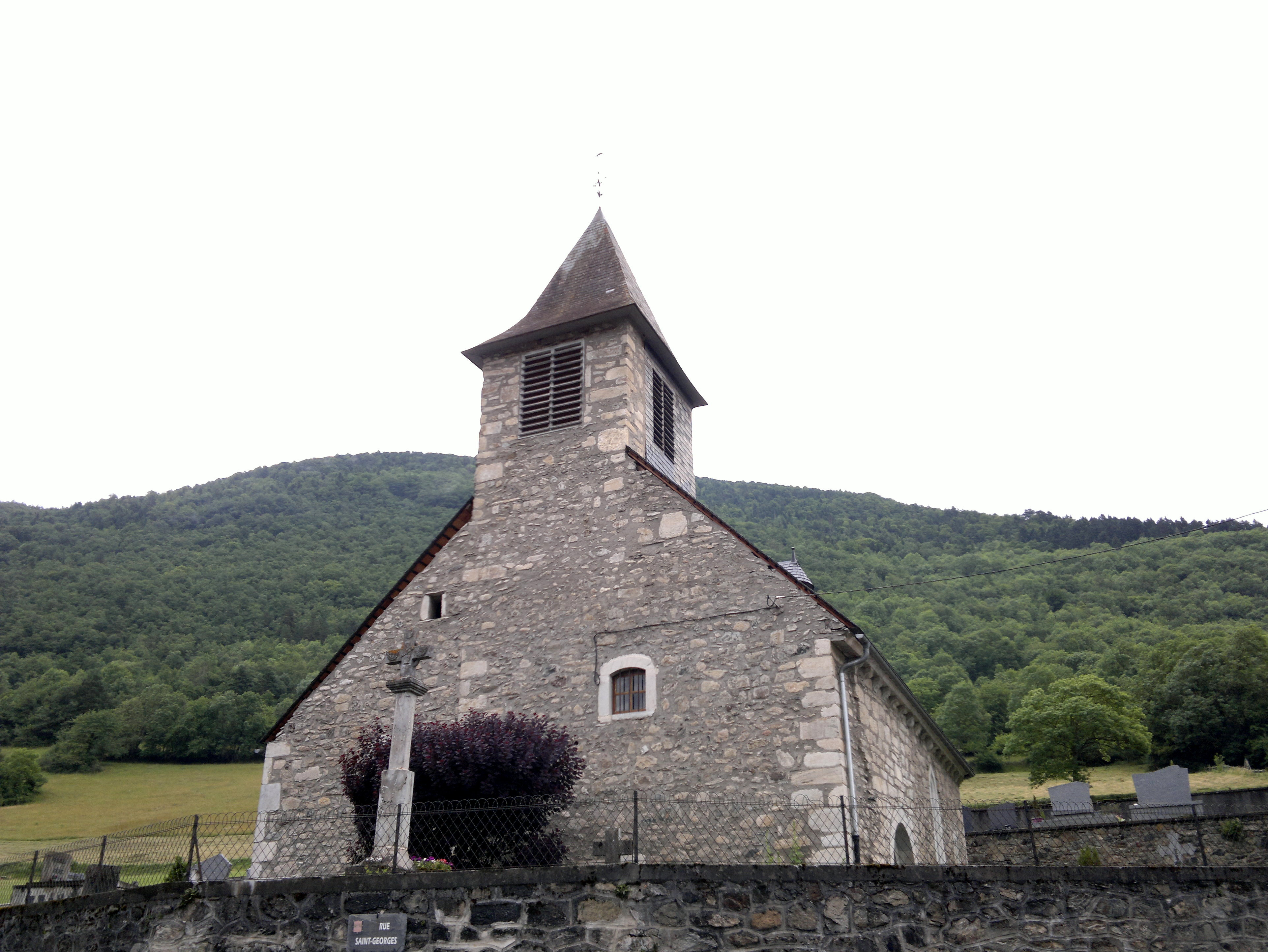 Église Saint-Just-Saint-Pasteur, Fr-65-Grézian.